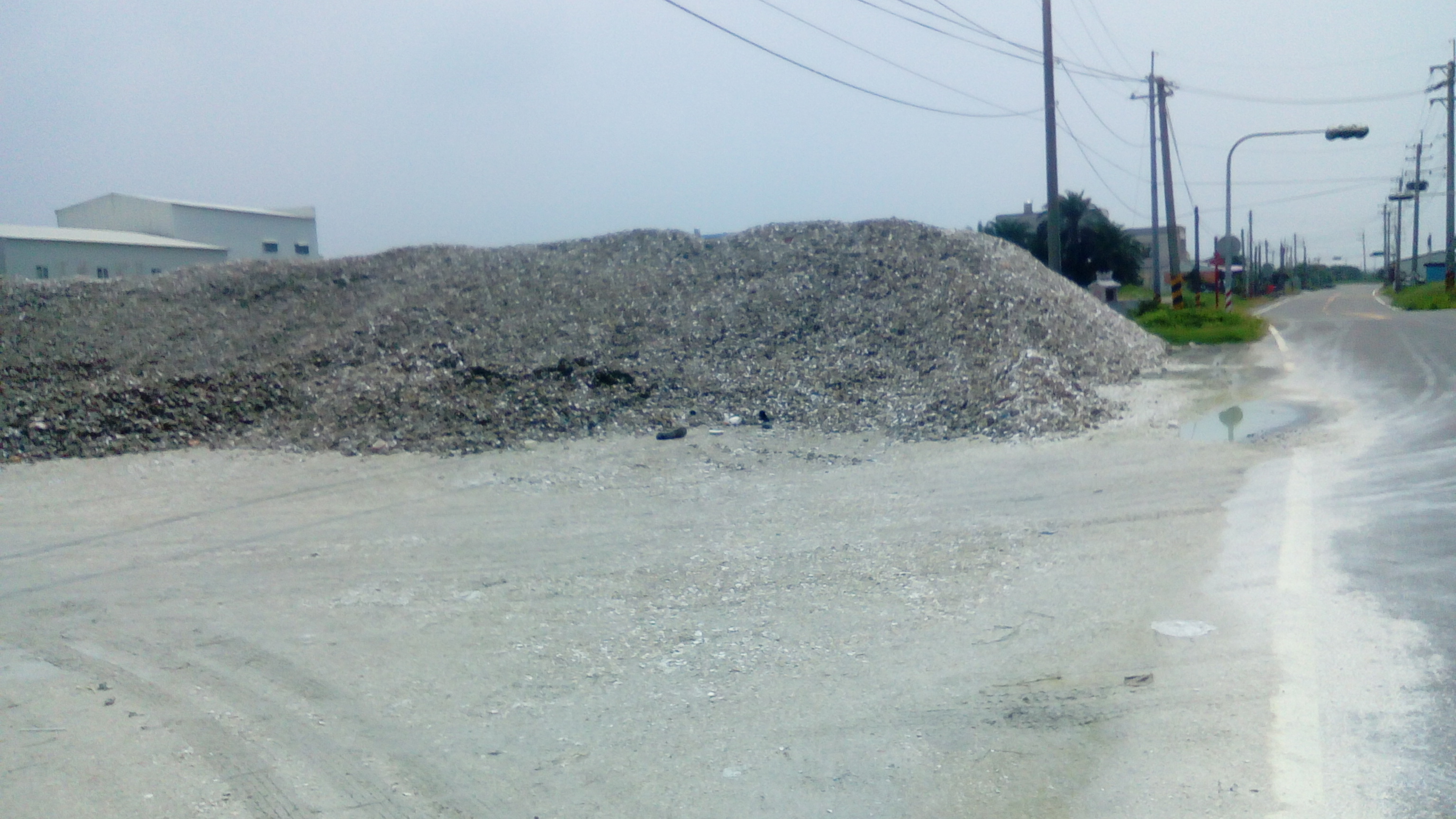 蚵仔為東石鄉的特產